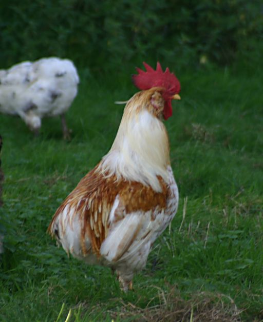 Kaulhahn